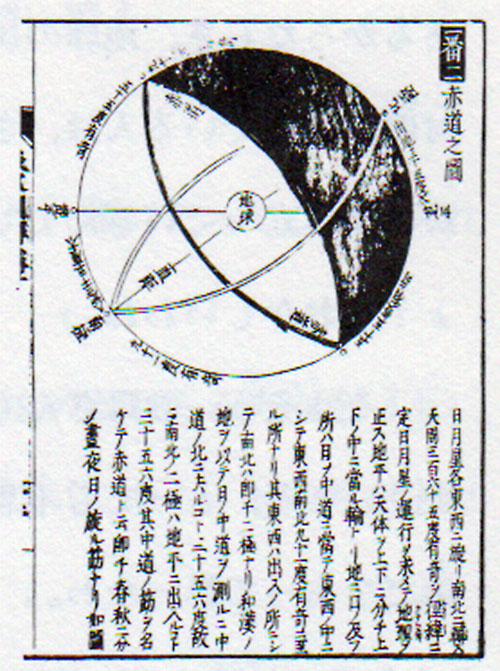 元禄時代1689年に井口常範が書いた『天文図解』に出てくる「地球」は、日本で初めて使われた「地球」の語である。ただし「地球」の語は輸入された漢文書からの引用部分にしかないので，井口の造語ではない。当時の中国にいた宣教師がヨーロッパの知識を伝えたものである。